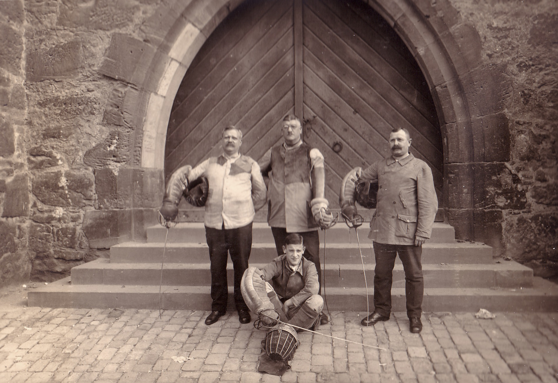 Die Heidelberger Fechtmeister